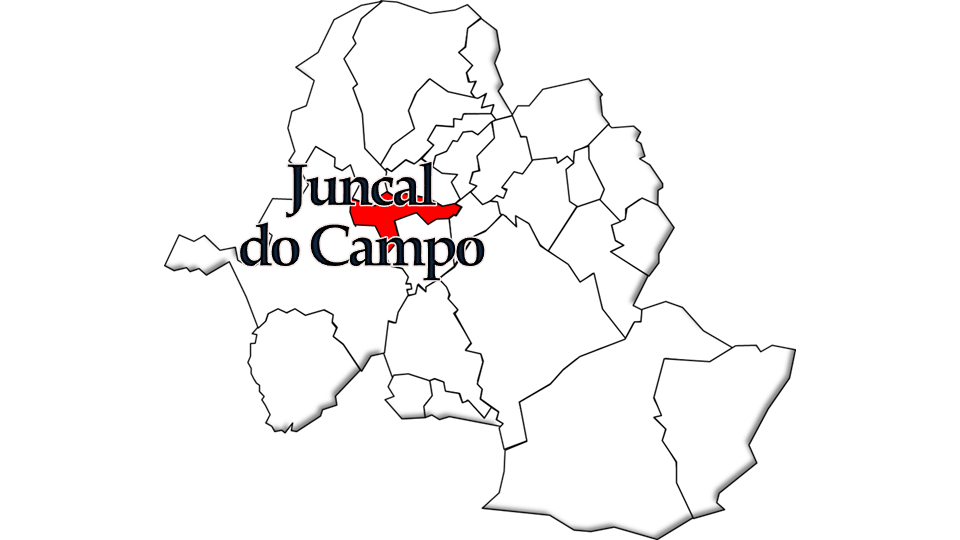 População